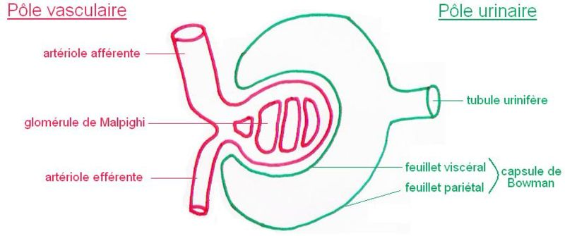 Schéma d'un corpuscule de Malpighi (début d'un néphron dans le rein). Catégorie: Système urinaire